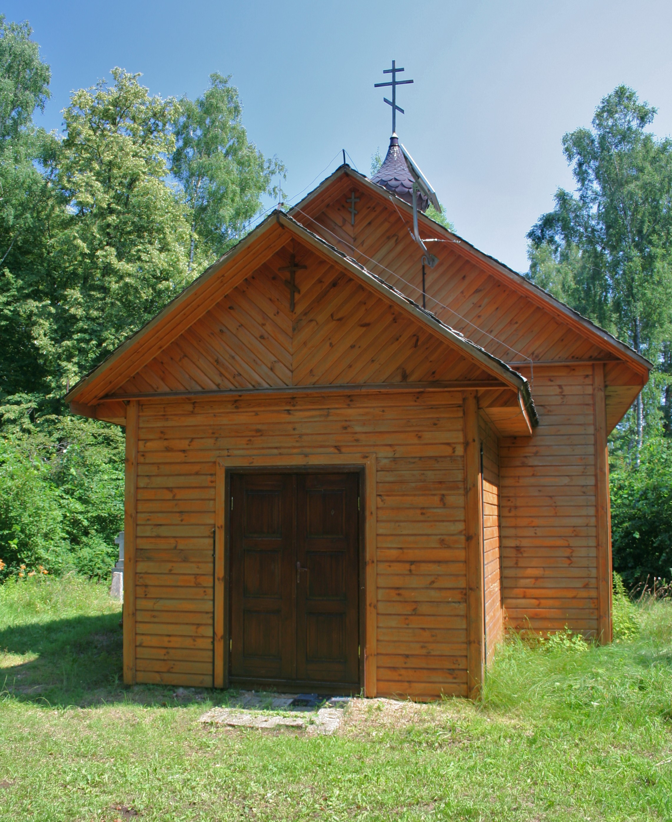 Kaplica Świętych Borysa i Gleba niedaleko wsi Jurowlany.